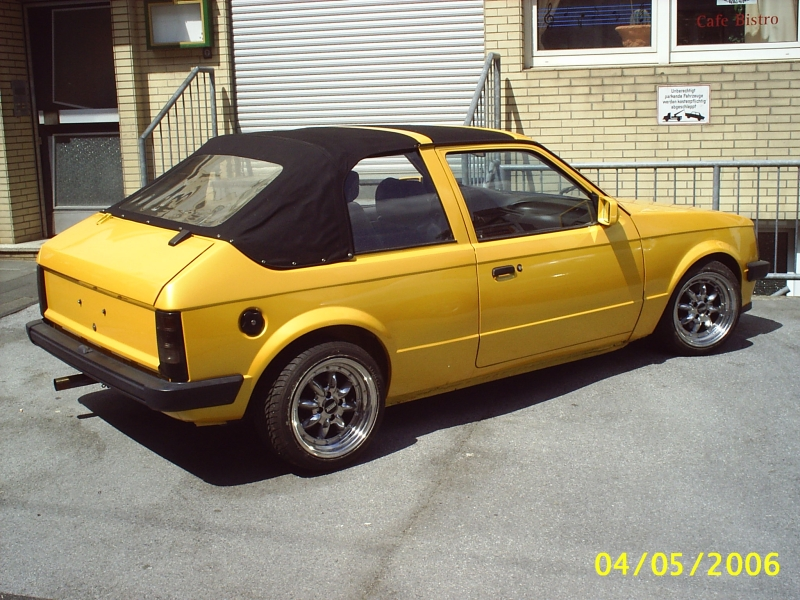 auto